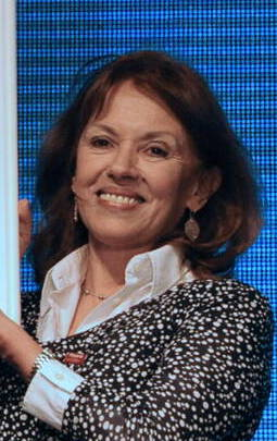 La presidenta Cristina Fernández de Kirchner encabezó esta tarde la ceremonia central en celebración por el Bicentenario de la fundación de la ciudad de Paraná, capital de Entre Ríos. Durante el acto se firmaron convenios para obras y se entregaron certificados de programas nacionales. La Jefa de Estado volvió a reclamar la unidad de los argentinos en temas fundamentales como la inclusión social. Y aseguró que “hay que empoderar al pueblo de cada una de las conquistas, para que no dependan de liderazgos”.